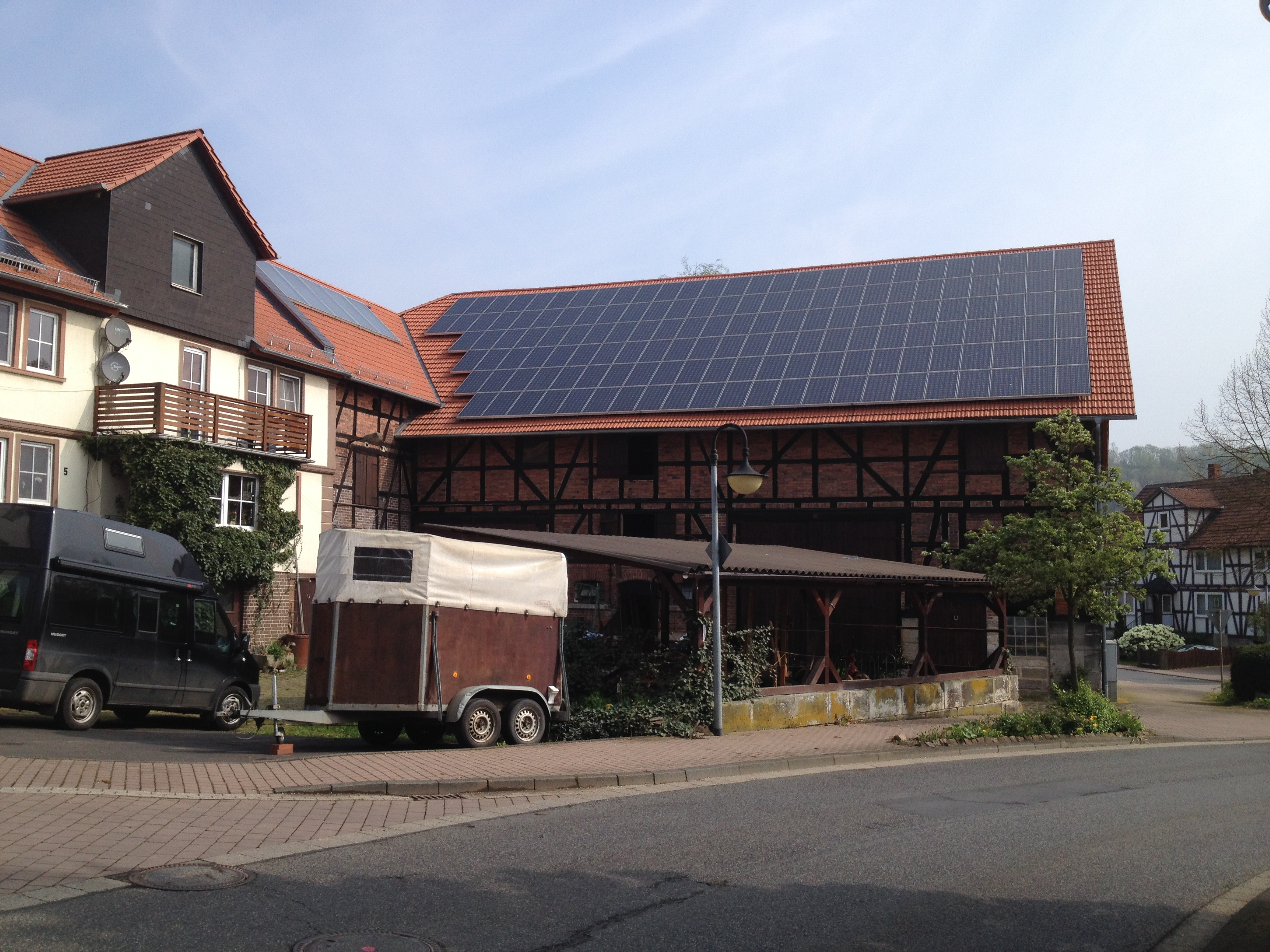 Eco Pfad Kulturgeschichte Guntershausen, Kassel-Steig, Baunapfad